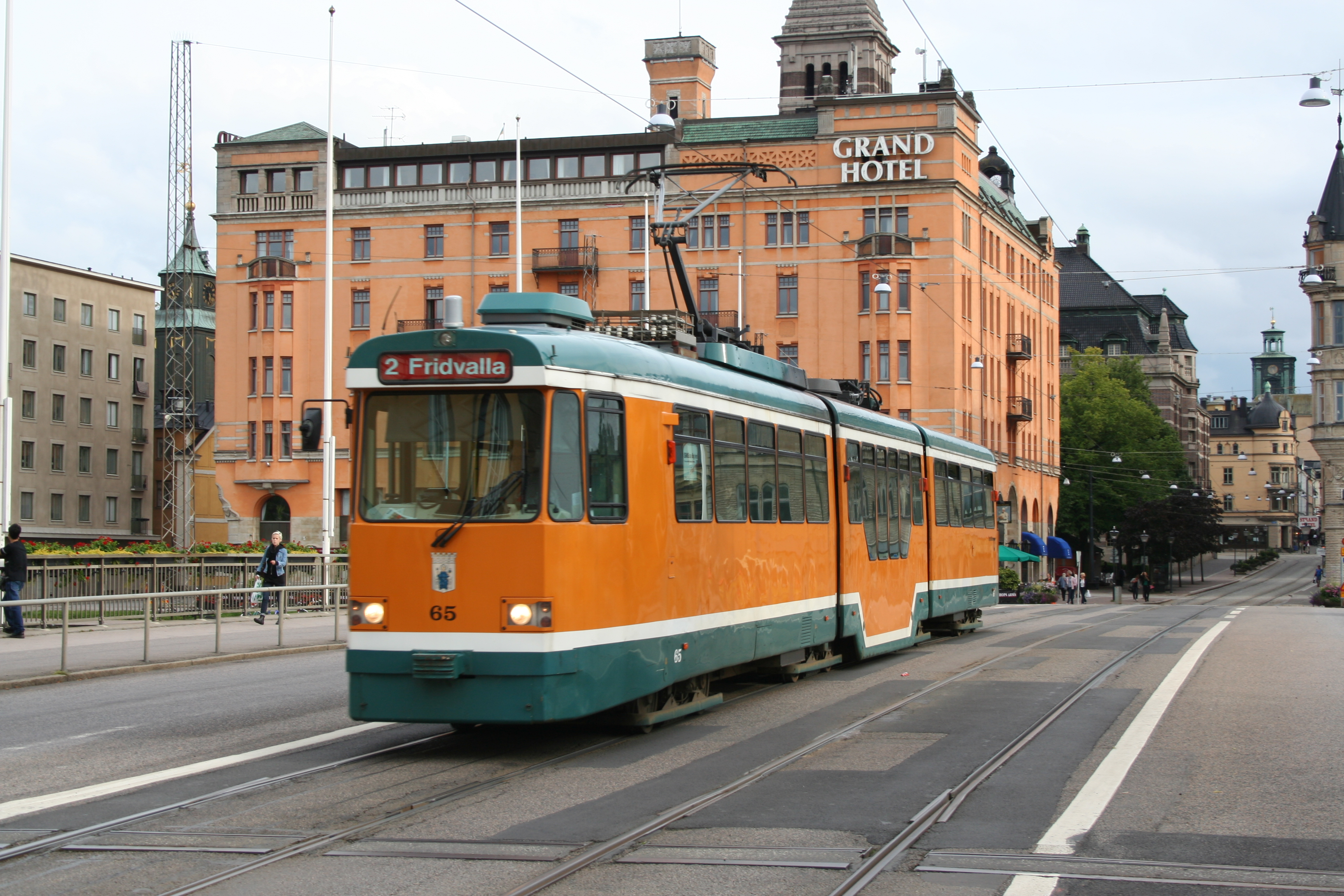 Spårvagn M97 65 KASSEL på Saltängsbron i Norrköping 07.08.08